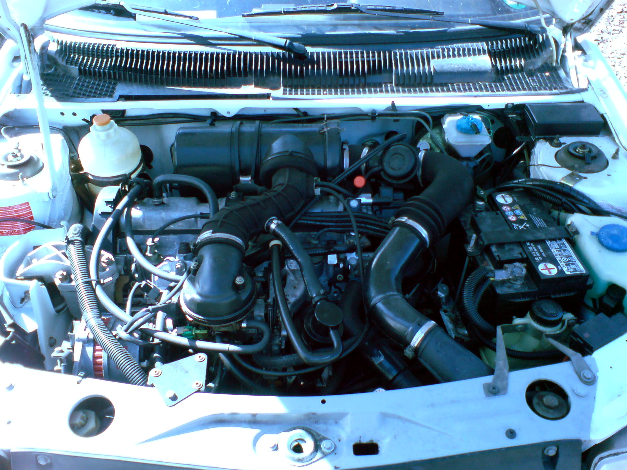 XU Motor eines Peugeot 205 Automatik